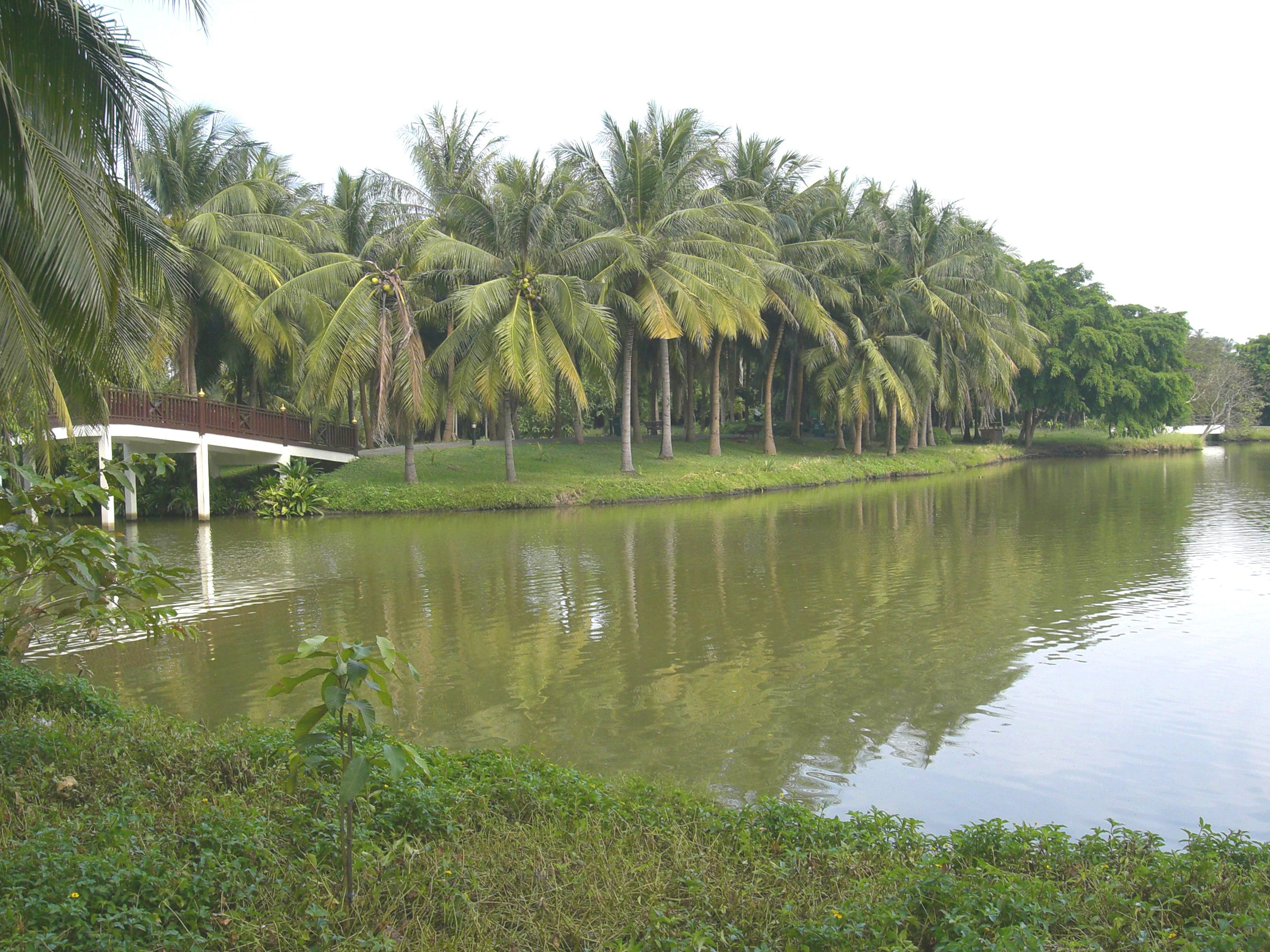 Park Suan Sri Nakhon Khuenkhan in Phra Pradaeng, Thailand